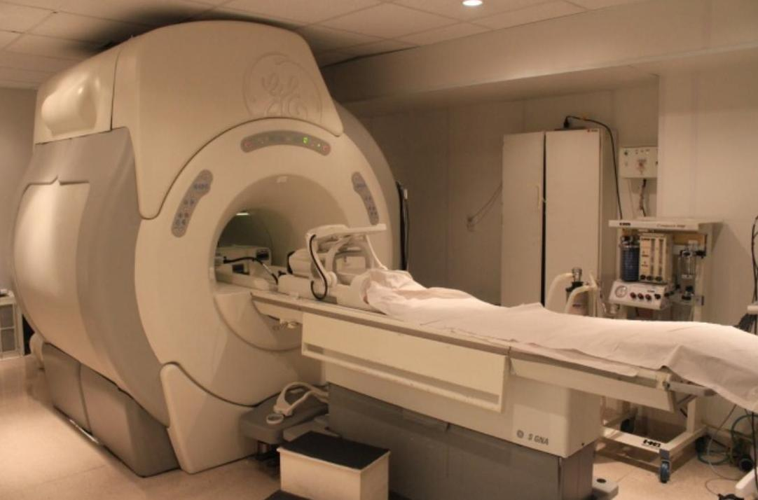 Equipamento de ressonância magnética do Hospital Alvorada - São Paulo - SP